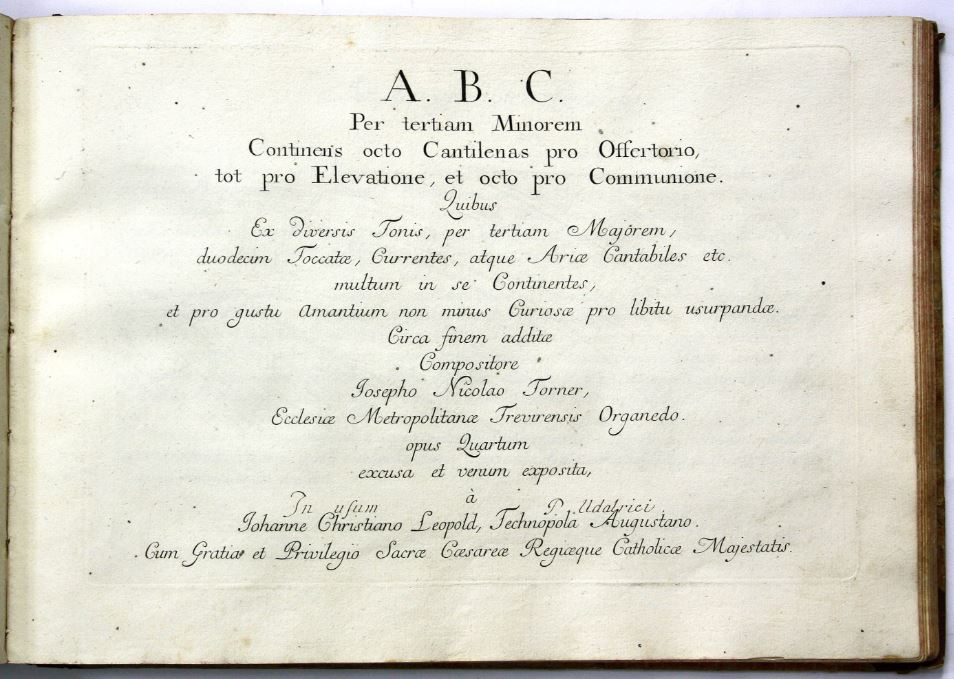 A.B.C. per tertiam minorem. Werk des Organisten und Komponisten Joseph Nicolaus Torner in einer Anthologie barocker Musikstücke mit Werken der Komponisten Johann Fischer (1662-1742), Felix Gass (1715-1752) und Joseph Nicolaus Torner (1700-1762), entstanden 1747 im Kloster Ettal.